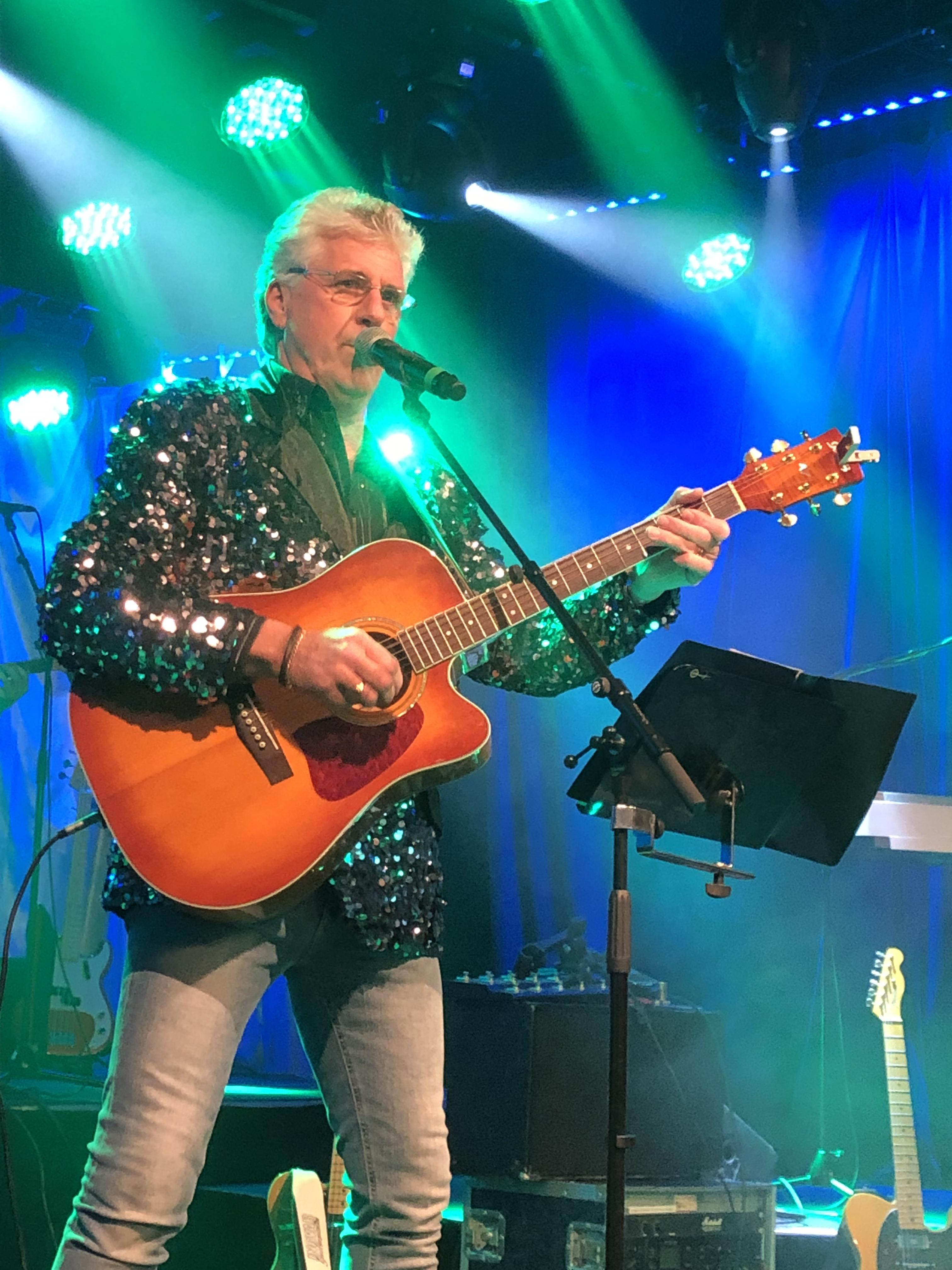 Paul Sahlin uppträder som Paul Paljett i Trollhättan, 2019. Foto: Johan Rosén